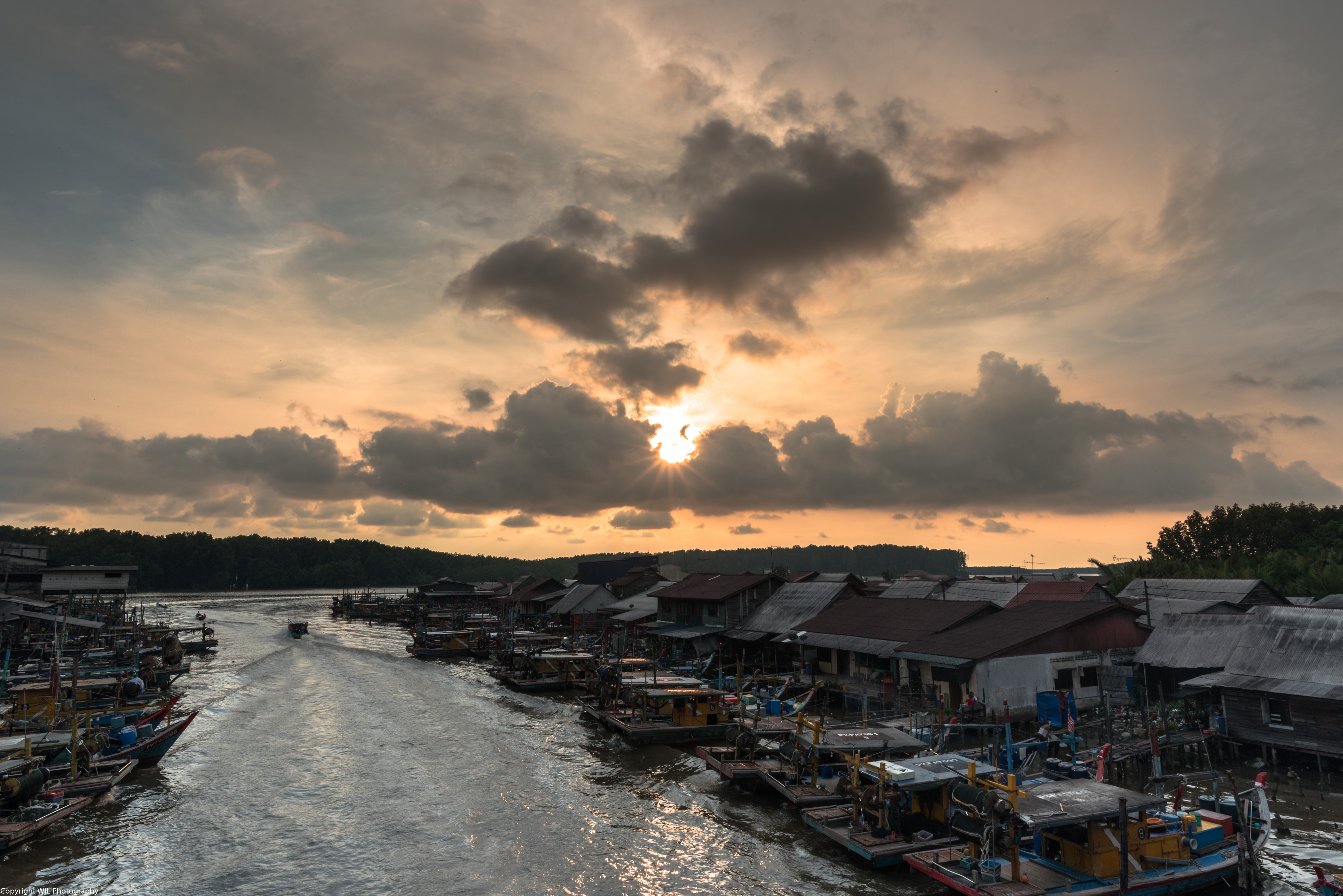 Kuala Sepetang Sunset